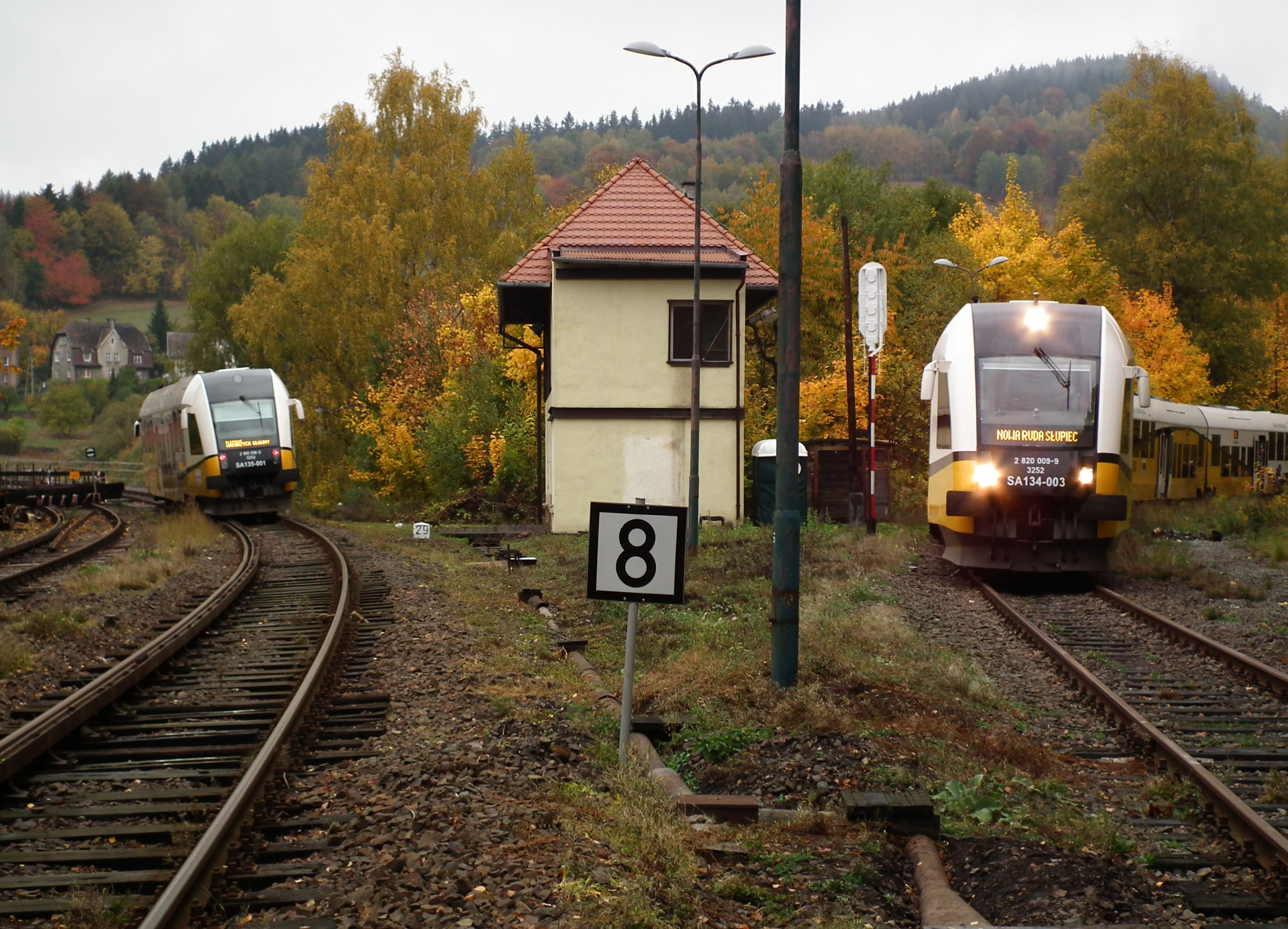 Impreza kolejowa Dolnośląskie Zakamaeki II w dniu 17 października 2015r. na liniach kolejowych Dolnego Śląska. Skład pociągu złożony z SA134-003 i SA134--007. Ludwikowice Kłodzkie.